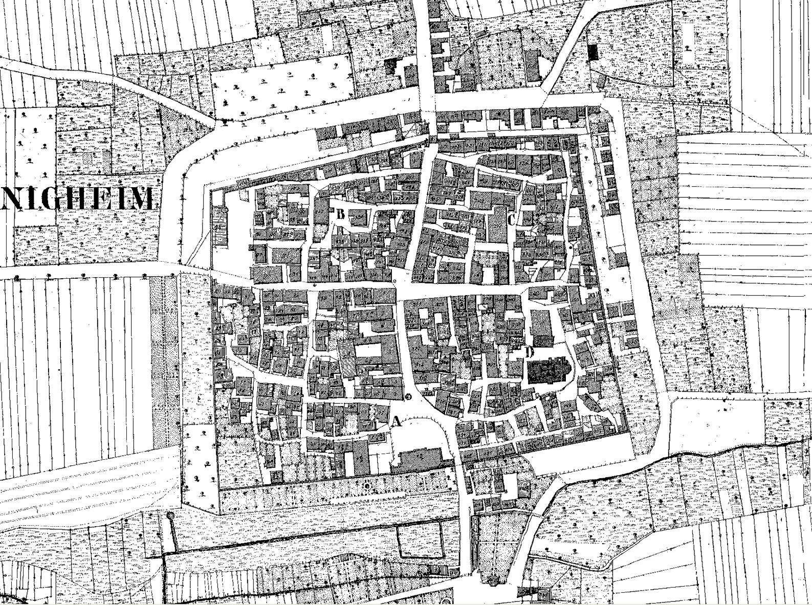 Stadtplan von Bönnigheim aus der Urflurkarte von 1832, Kartenblatt NO LI 3 (Ausschnitt)